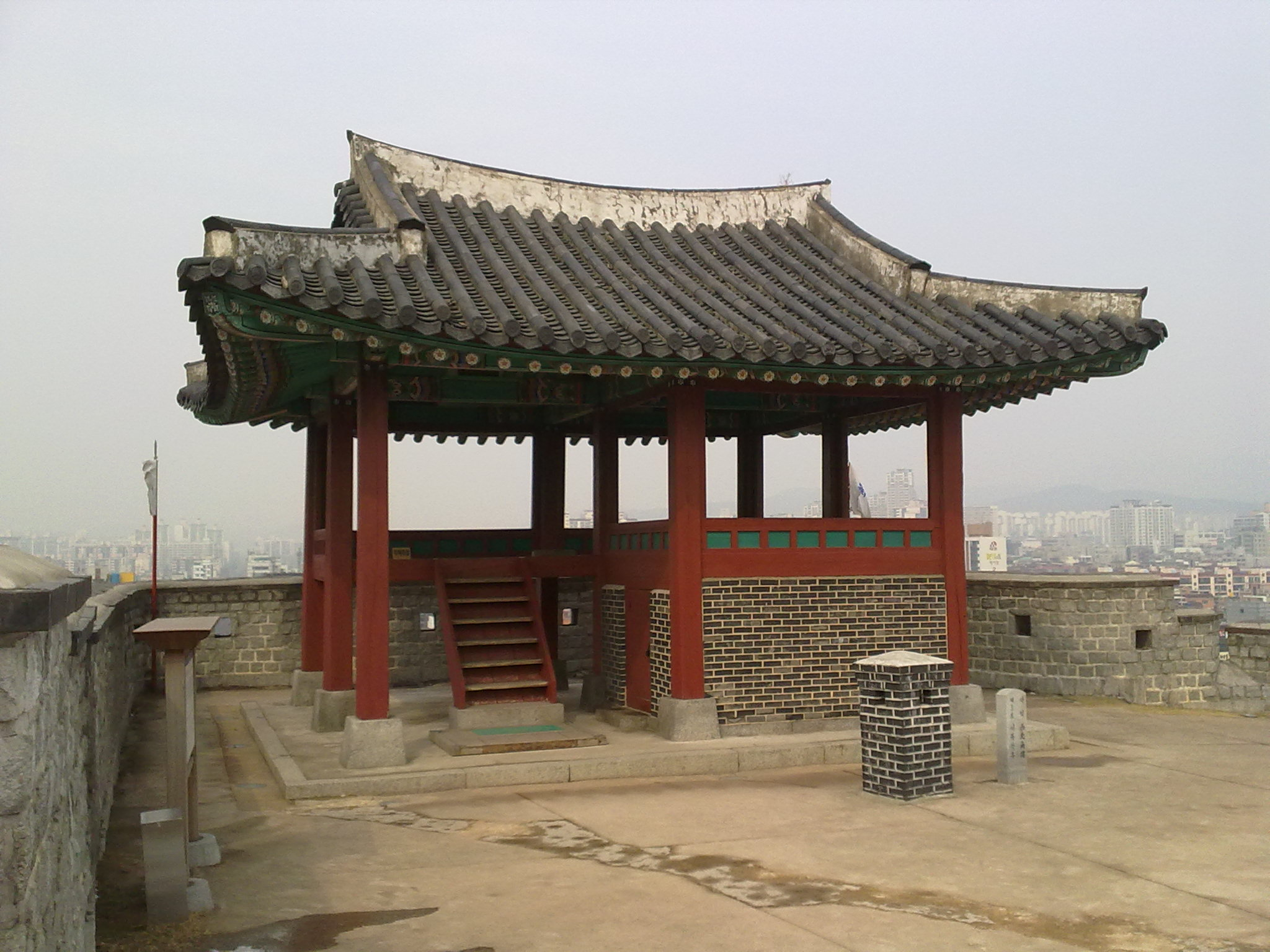 수원 화성 서북각루